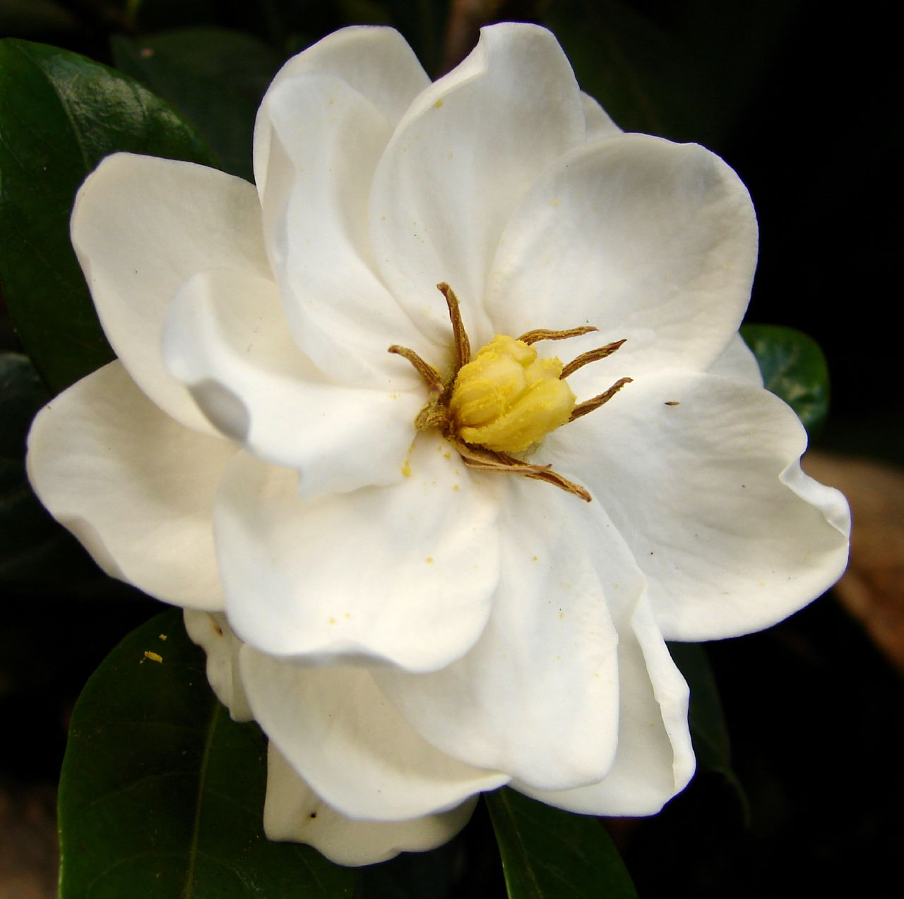 Gardenia